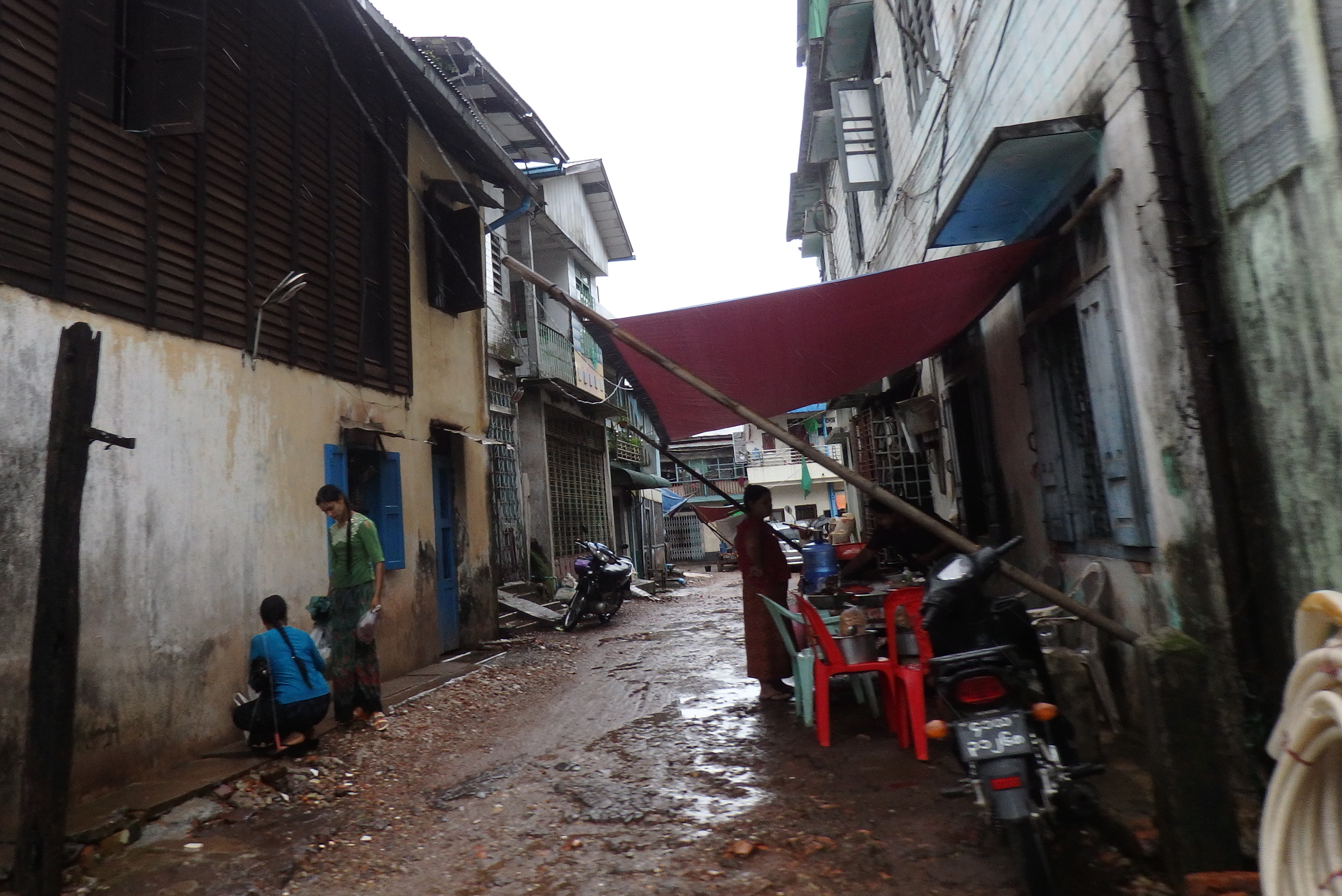 Mawlamyine MMR011001701, Myanmar (Burma)